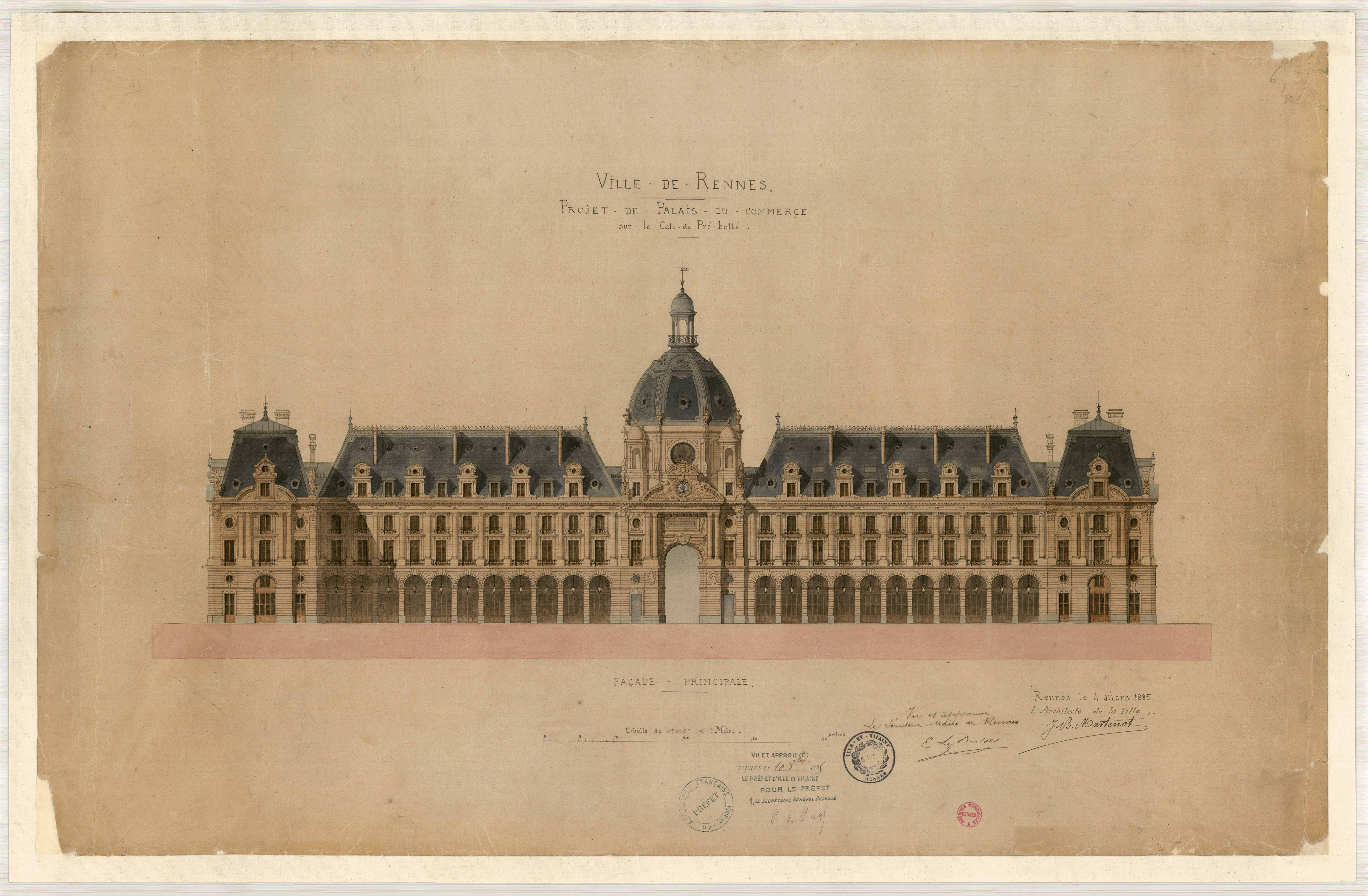 Projet d'un Palais du commerce sur la cale du Pré-Botté : élévation de la façade principale. Archives municipales de Rennes, 2Fi552.